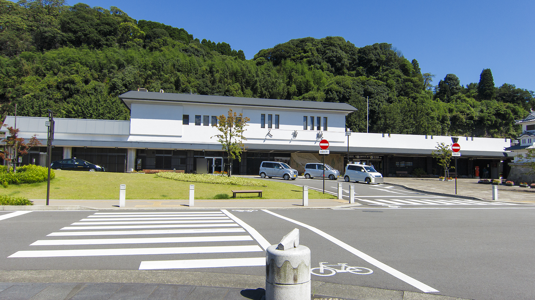 九州旅客鉄道株式会社肥薩線くま川鉄道株式会社湯前線人吉駅